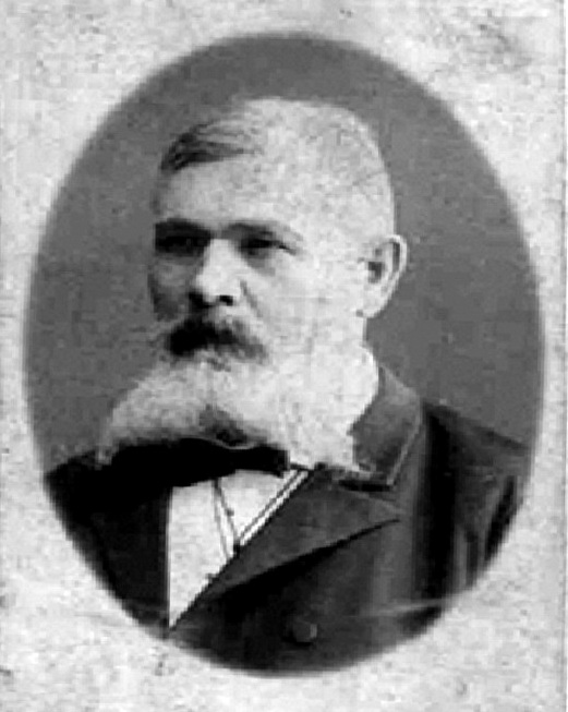 Мартин Григорьевич Грушецкий (1829 - ок. 1908) – титулярный советник, дворянин Могилёвской губернии, мещанин (римско-кат. вероисп.). Родился в Могилёвской губернии. В 1848 г. Окончил Могилёвскую губернскую гимназию. Служил в Могилёвском губернском правлении. Около 1868 г. покинул Могилевщину. Позже служил нотариусом в Пензе.